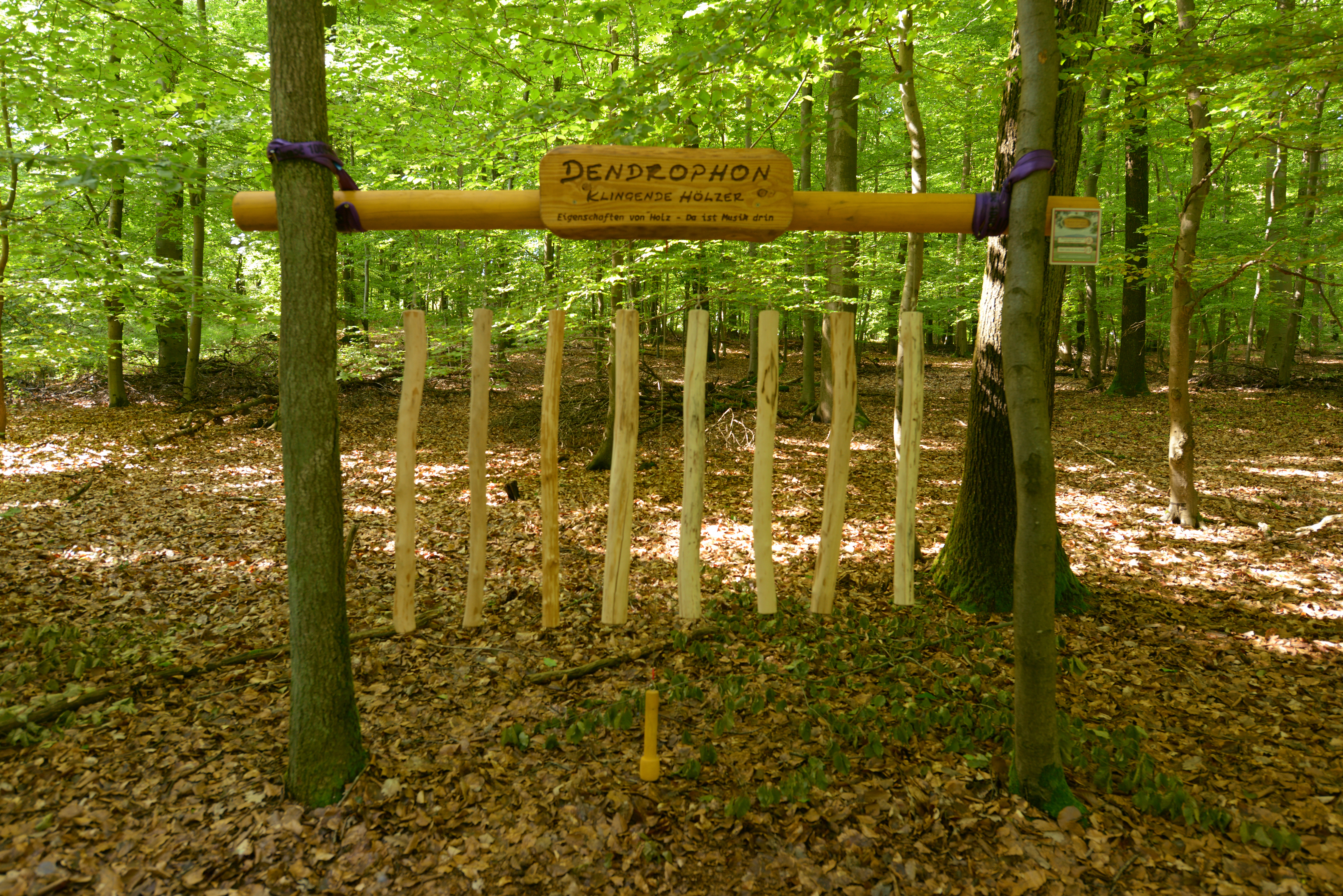 Dendrophon am Lehrpfad "Naturerlebnis Bamsterwald" des Natur- und Vogelschutzvereins Uchtelfangen, Bamsterwald, Uchtelfangen, Gemeinde Illingen/ Deutschland (2019).